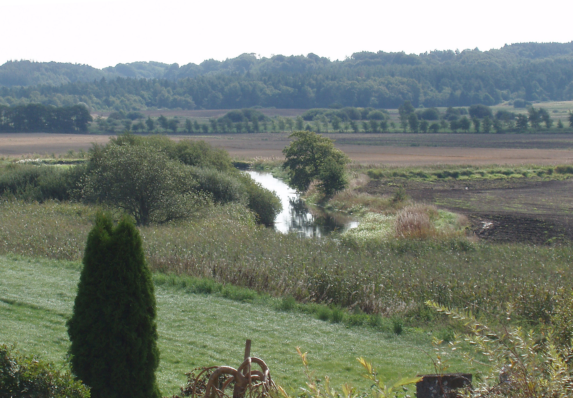 Nørrå set fra Skjern Kirke Viborg Kommune i Jylland Denmark